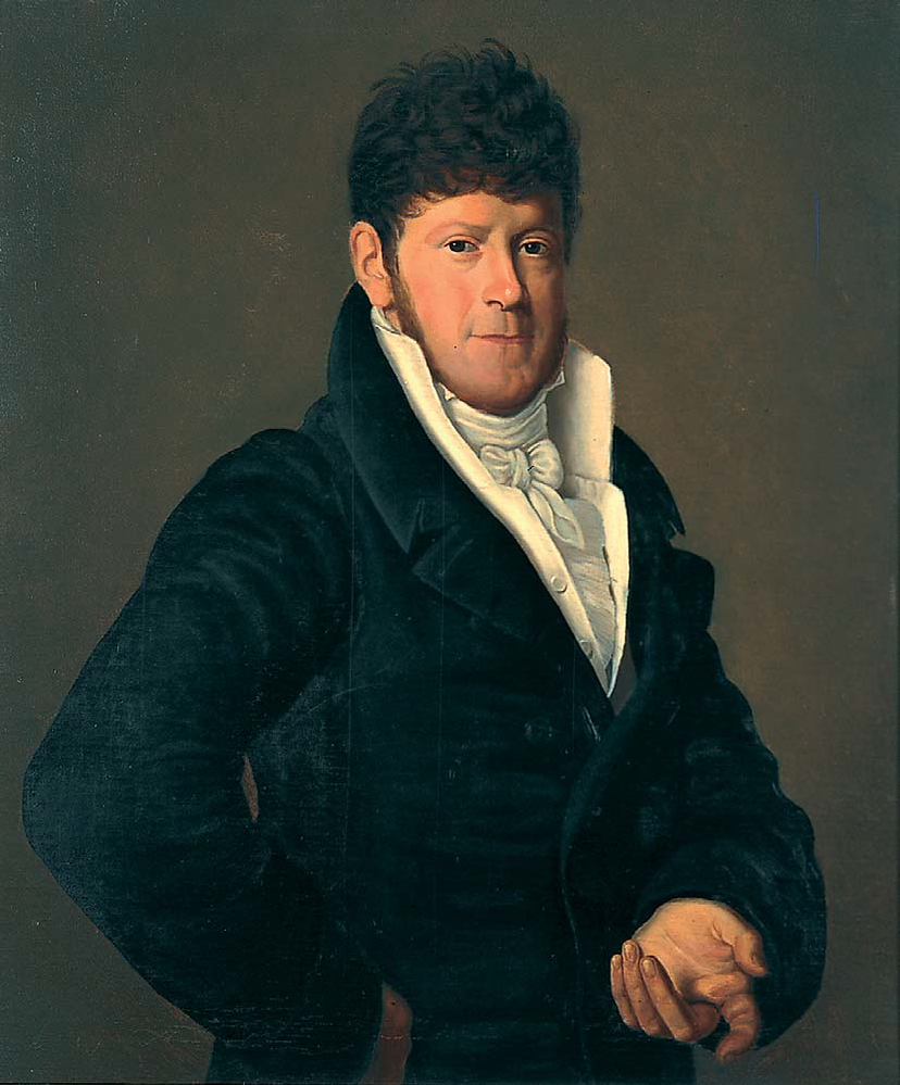 Heinrich Christoph Kolbe, Daniel Heinrich von der Heydt (1767–1882), vor 1832, Replik?, von der Heydt-Museum